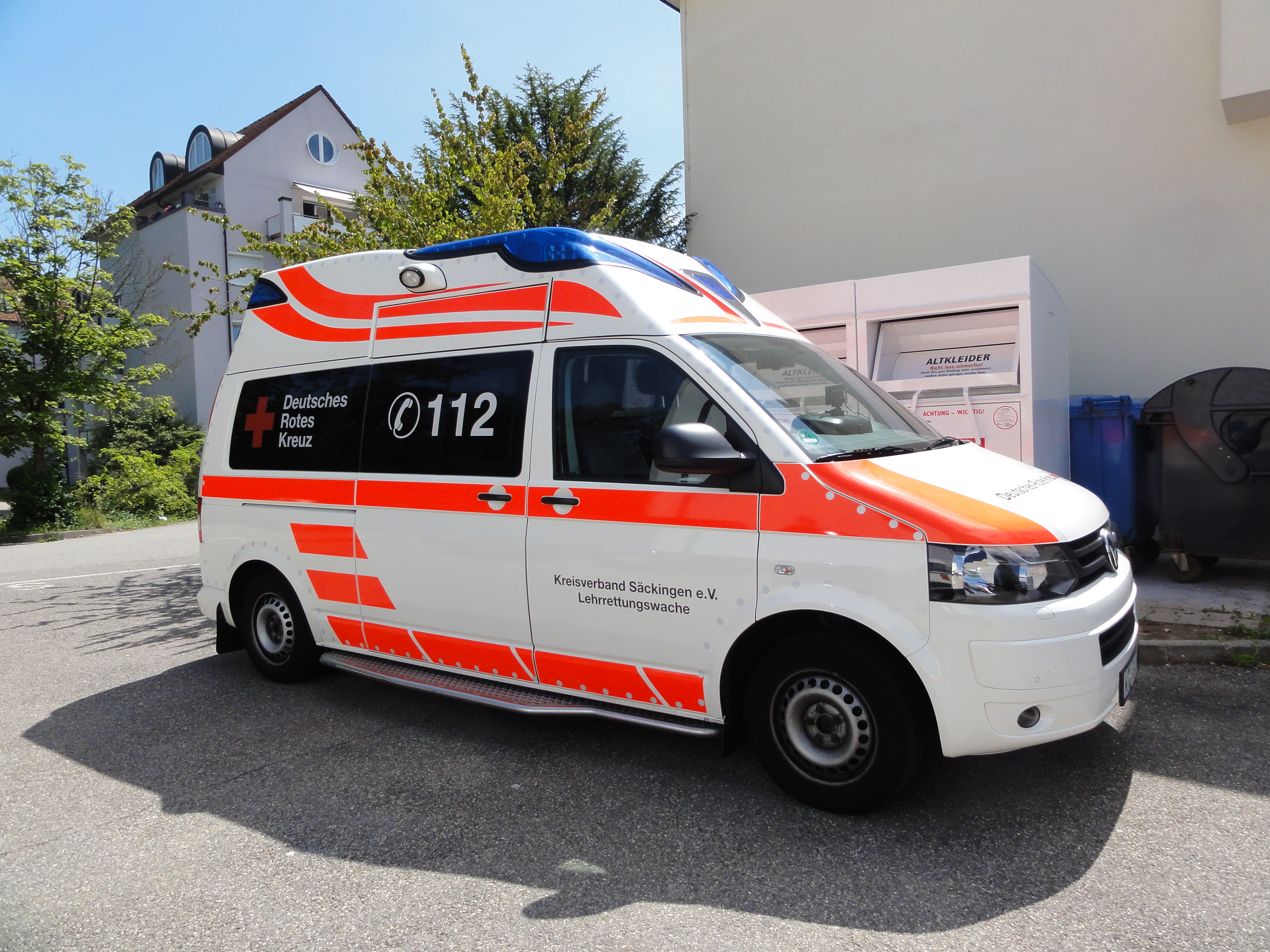 Bad Säckingen — DRK, Lehrrettungswache, Rettungswagen VW T5(2012)